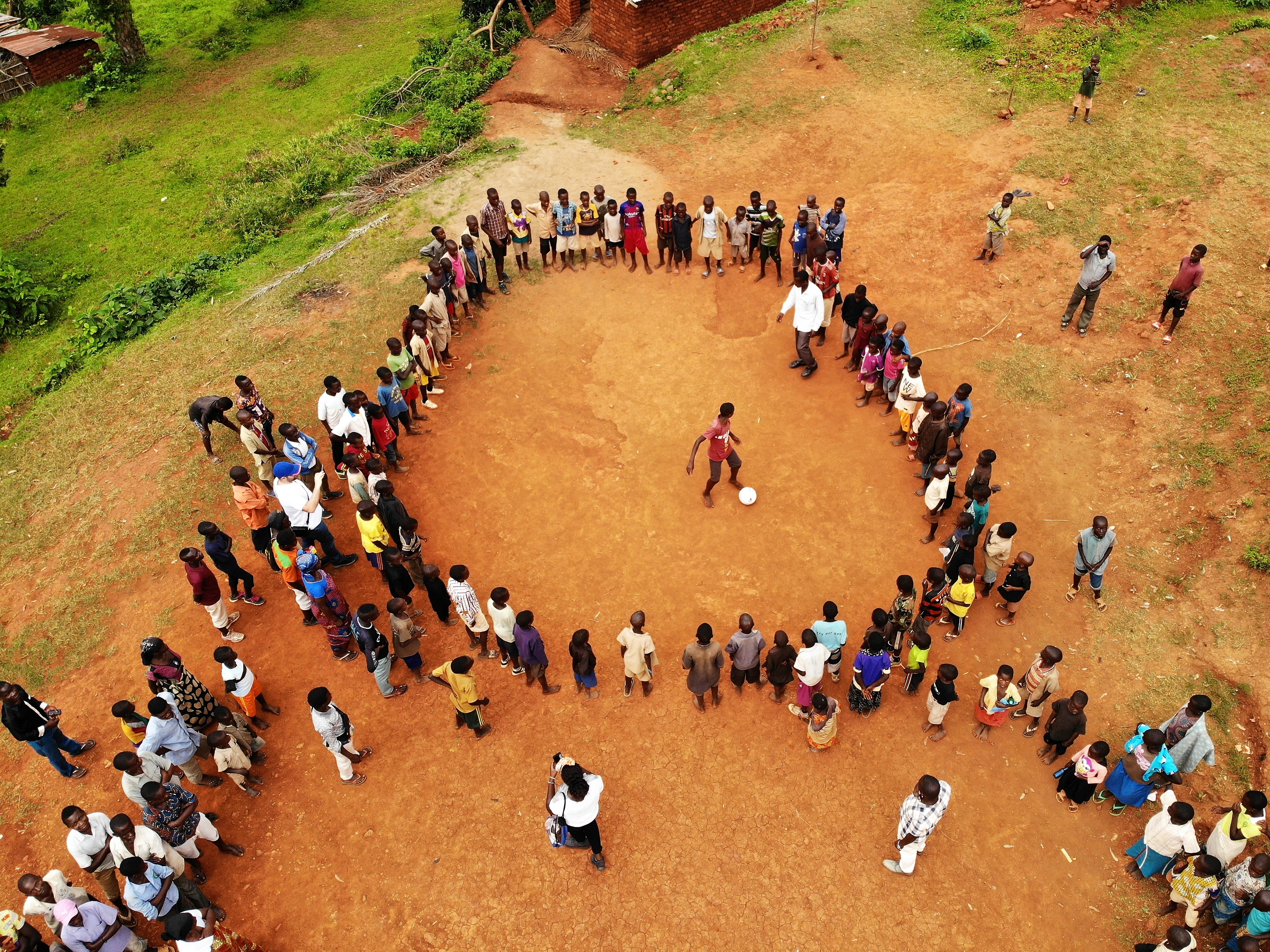 Los niños de esta escuela de Bururi, Burundi, recibieron por primera vez una pelota de futbol "verdadera", y automaticamente hicieron un circulo para jugar juntos This is an image with the theme "Play" from: Burundi